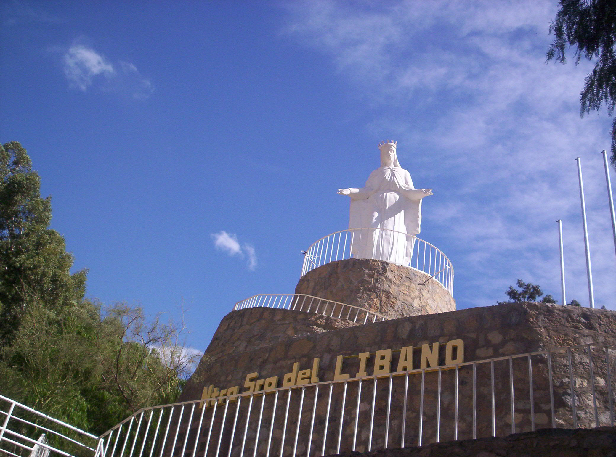 Fotografía que muestra una gigantesca estatua de la Virgen del Libano, en la Sierra Chica de Zonda, precisamente en la Quebrada de Zonda, Departamento Rivadavia, Provincia de San Juan, Argentina